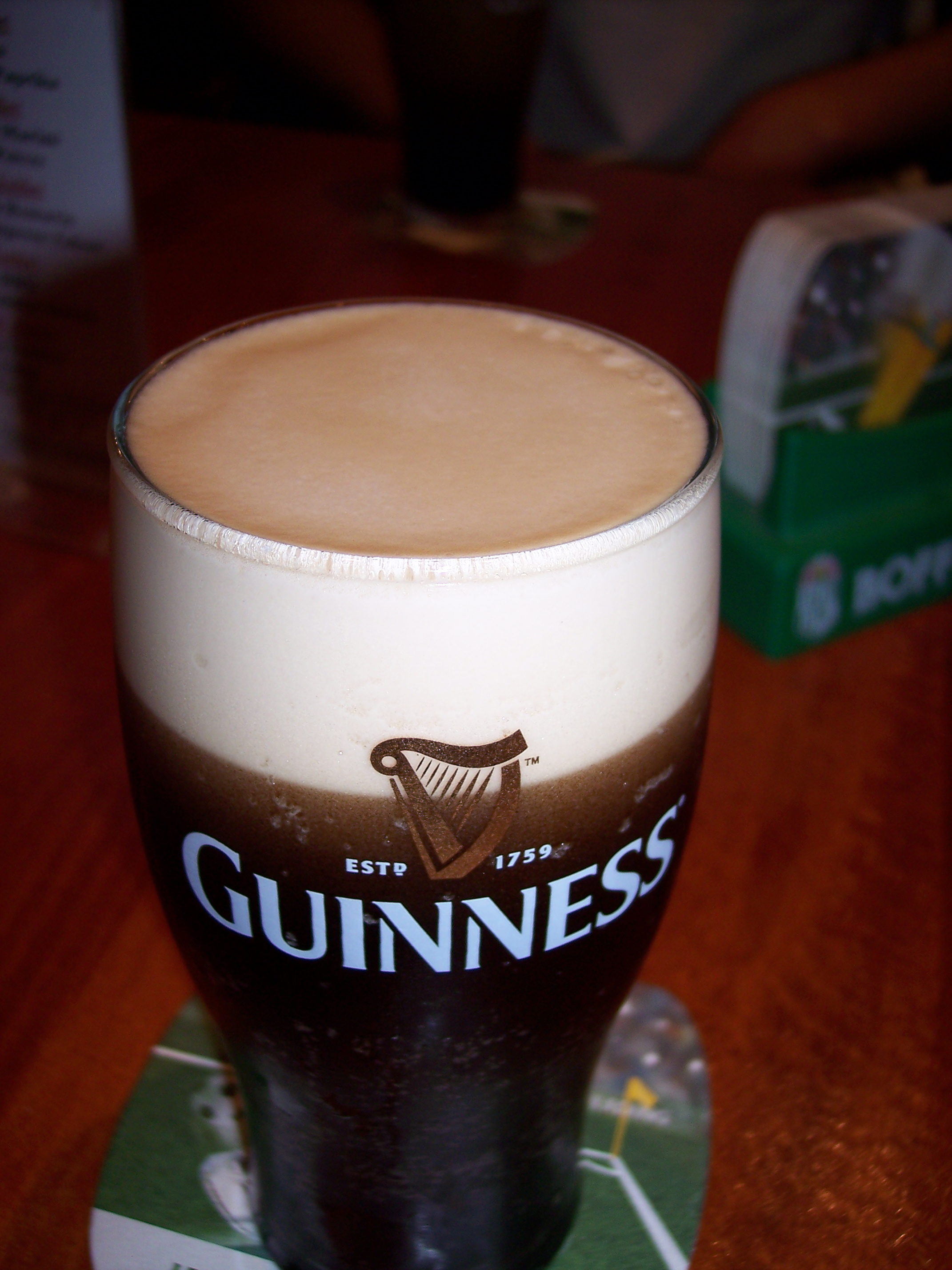 Glass Guinness surgered.jpg